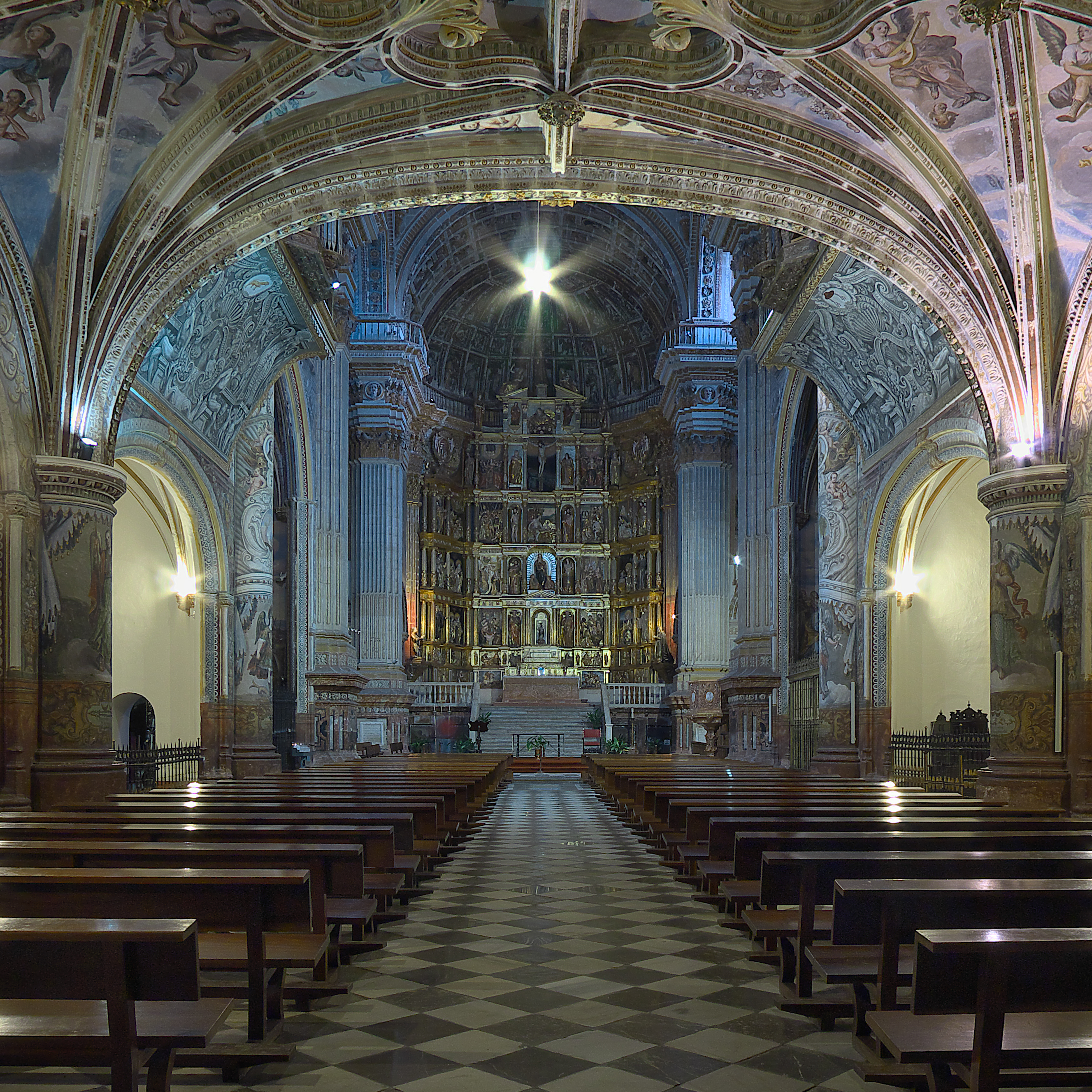 María Manrique de Lara, duquesa de Sessa y Terranova, dispuso (1523-1525) de Jacopo Florentino (Jacopo da Torni, L′Indaco) y posteriormente Diego de Siloé (1528-1543), protegido por el influyente prior fray Pedro Ramiro de Alba, para construir, con nuevo estilo arquitectónico, el panteón de su esposo.